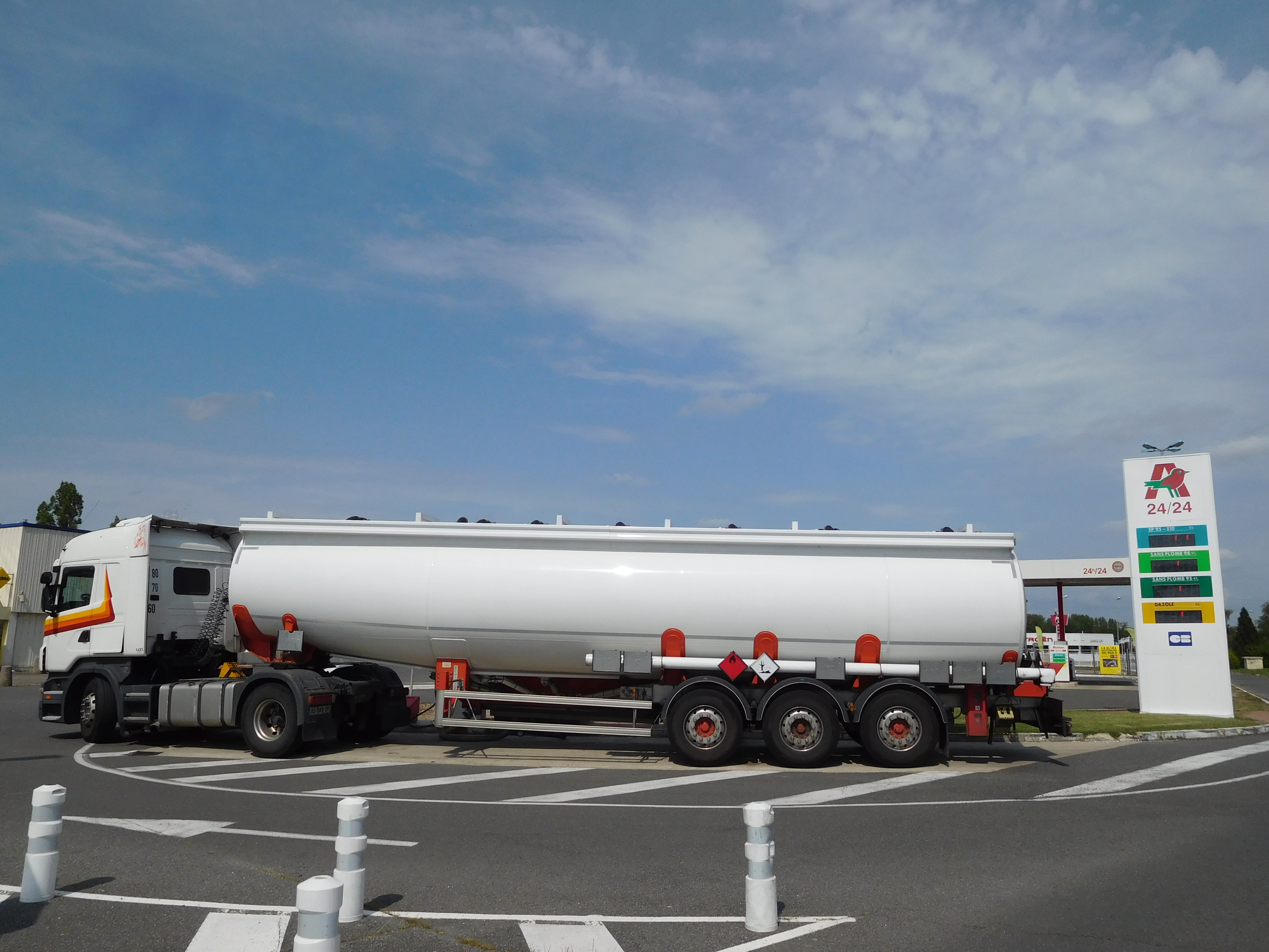 Approvisionnement : remplissage journalier des cuves (de SP95-E10, SP 98, SP 95, gazole) d'une station-service Auchan (par camion-citerne), Cosne-Cours-sur-Loire (Nièvre, France).